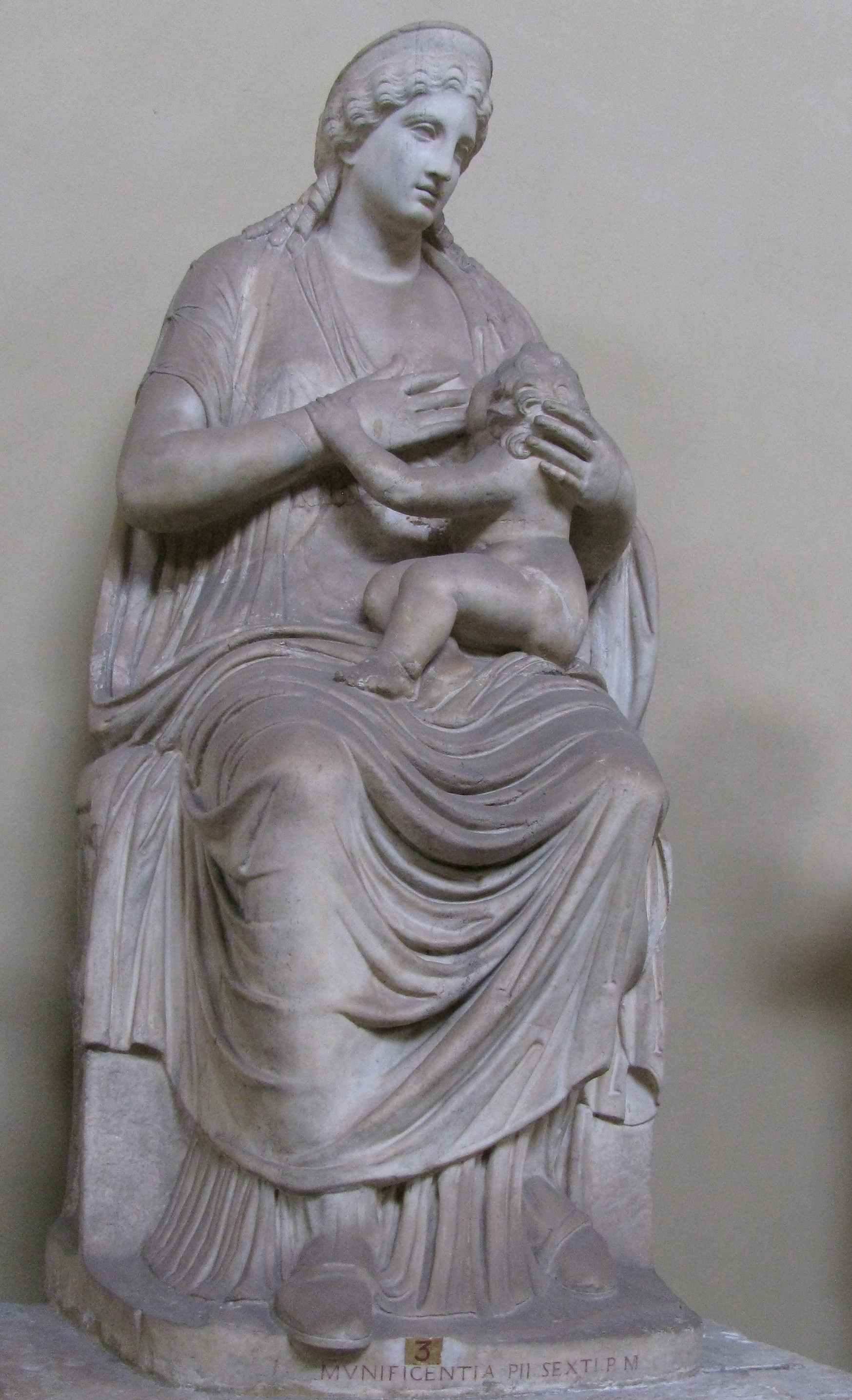 Isis lactans (Isis allaitant Harpocrate). Marbre, hauteur environ un mètre et demi. Musée du Vatican, galerie Pio Clementino